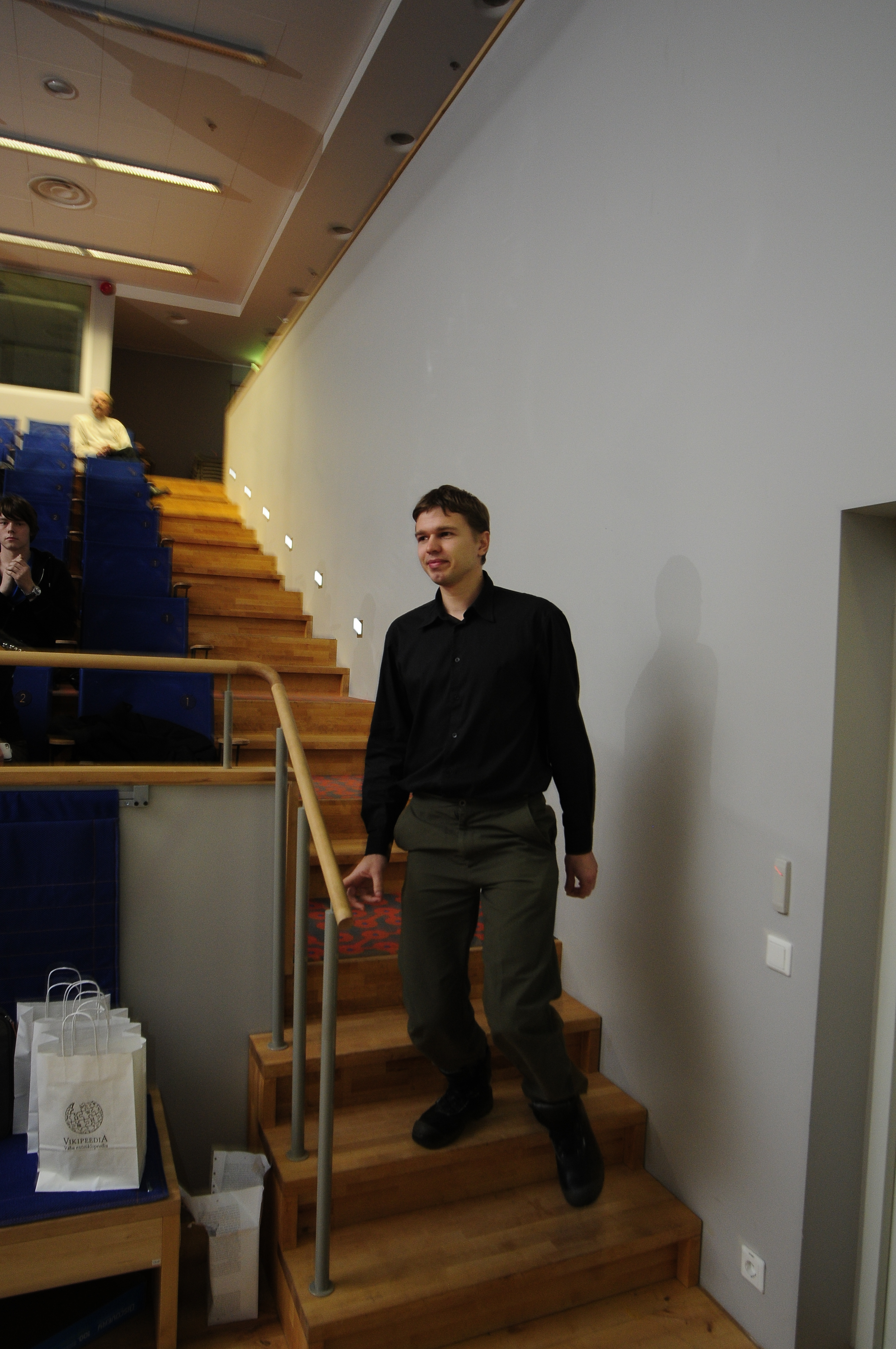 Teadusfoto 2012. Aasta teadusfoto autor: Tavo Romann.